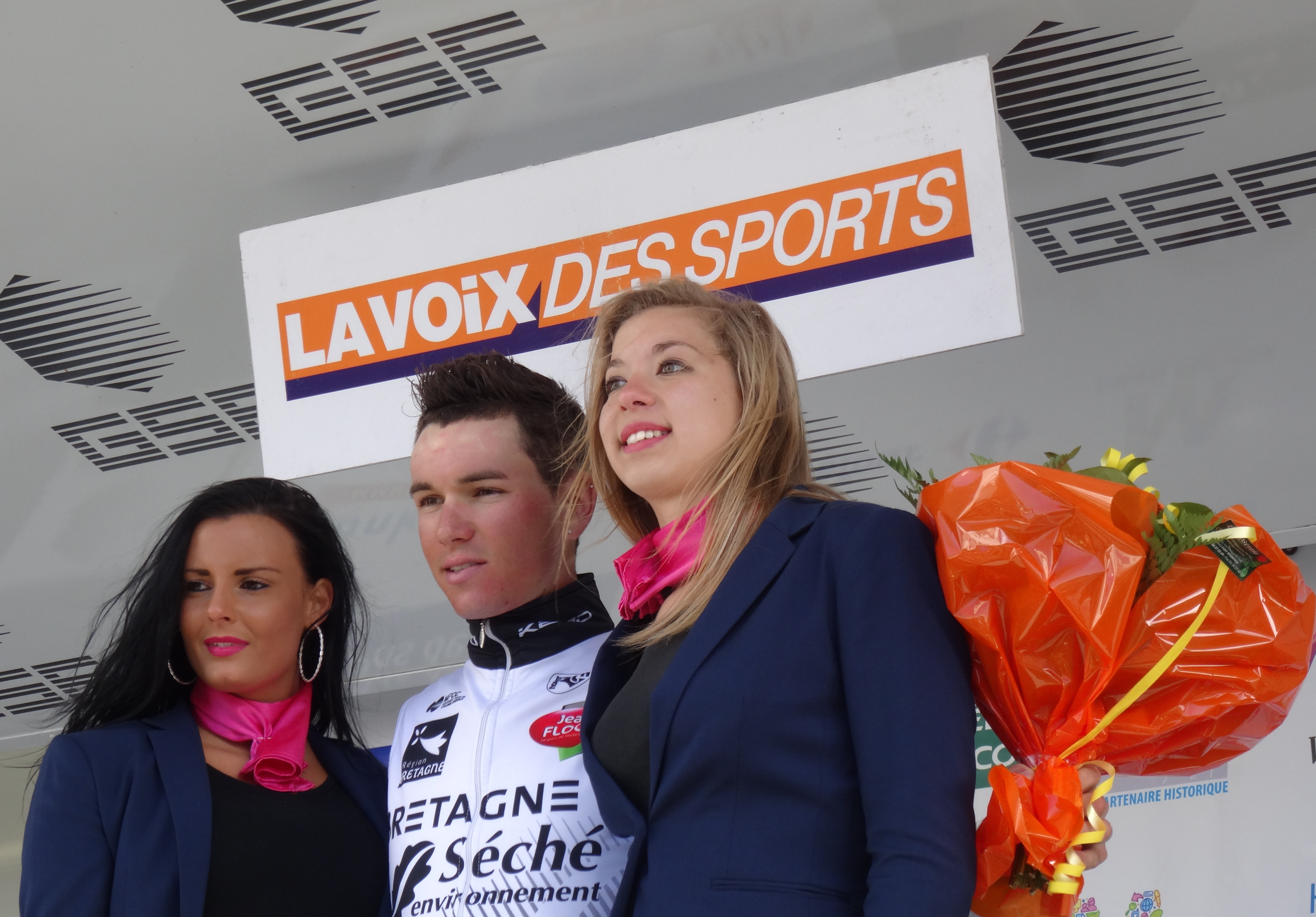 Reportage photographique réalisé le vendredi 9 mai 2014 à l'arrivée de la troisième étape de l'édition 2014 des Quatre jours de Dunkerque à Calais, Pas-de-Calais, Nord-Pas-de-Calais, France. Depicted person: Clément Koretzky Depicted team: Bretagne-Séché Environnement